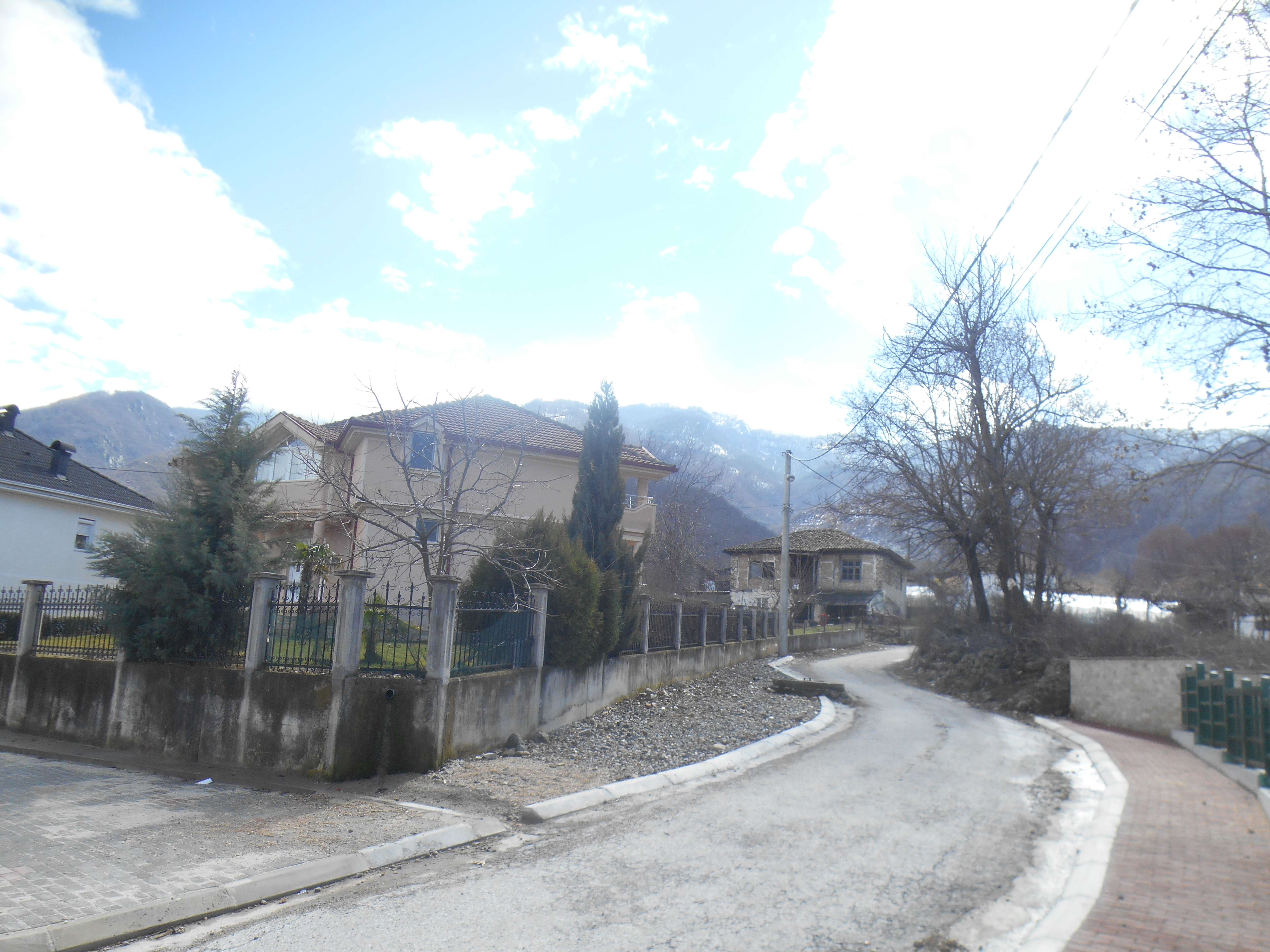 Борисово, Општина Ново Село